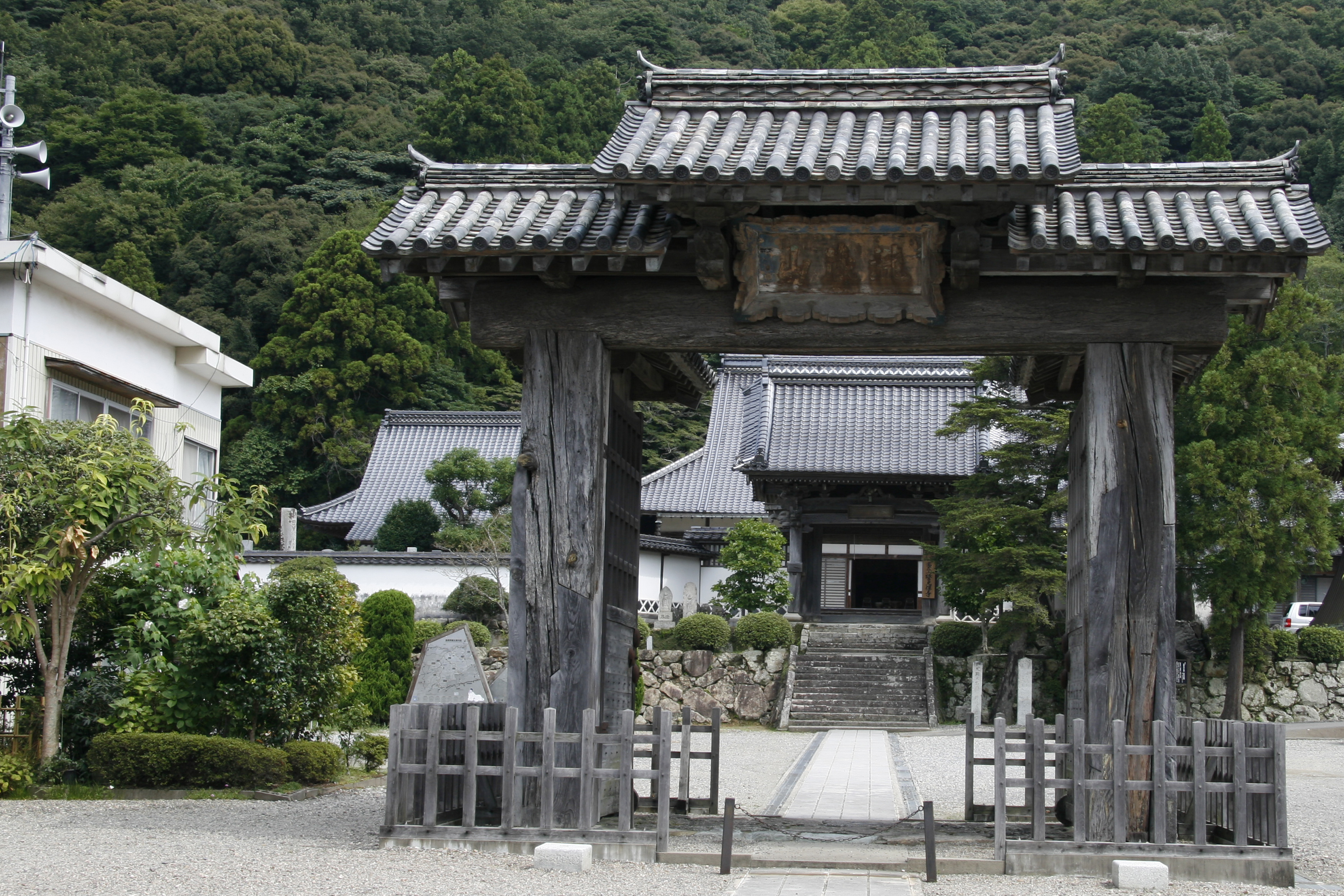 医光寺総門